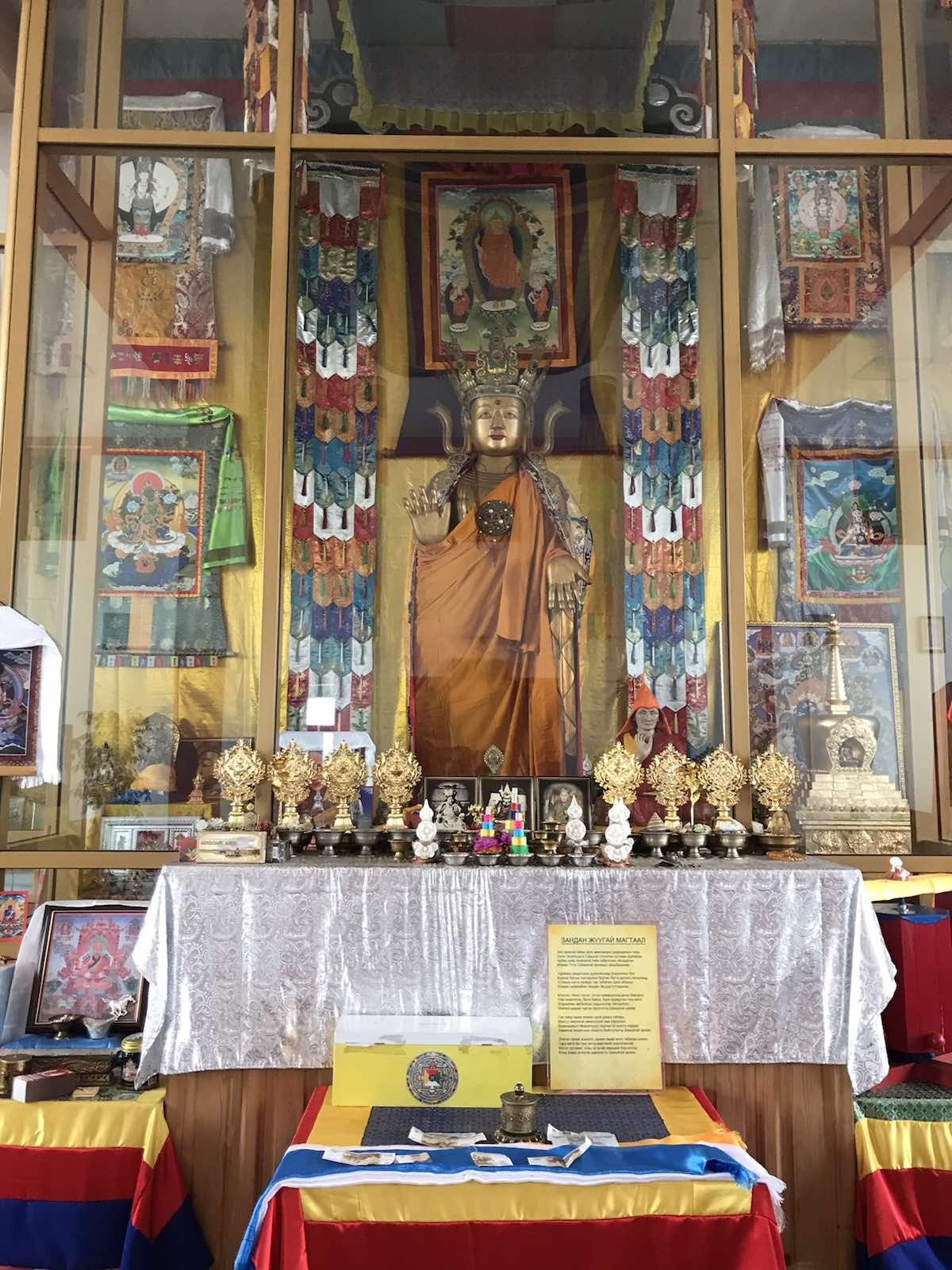 General view of the altar with a statue of Zandan Zhuu